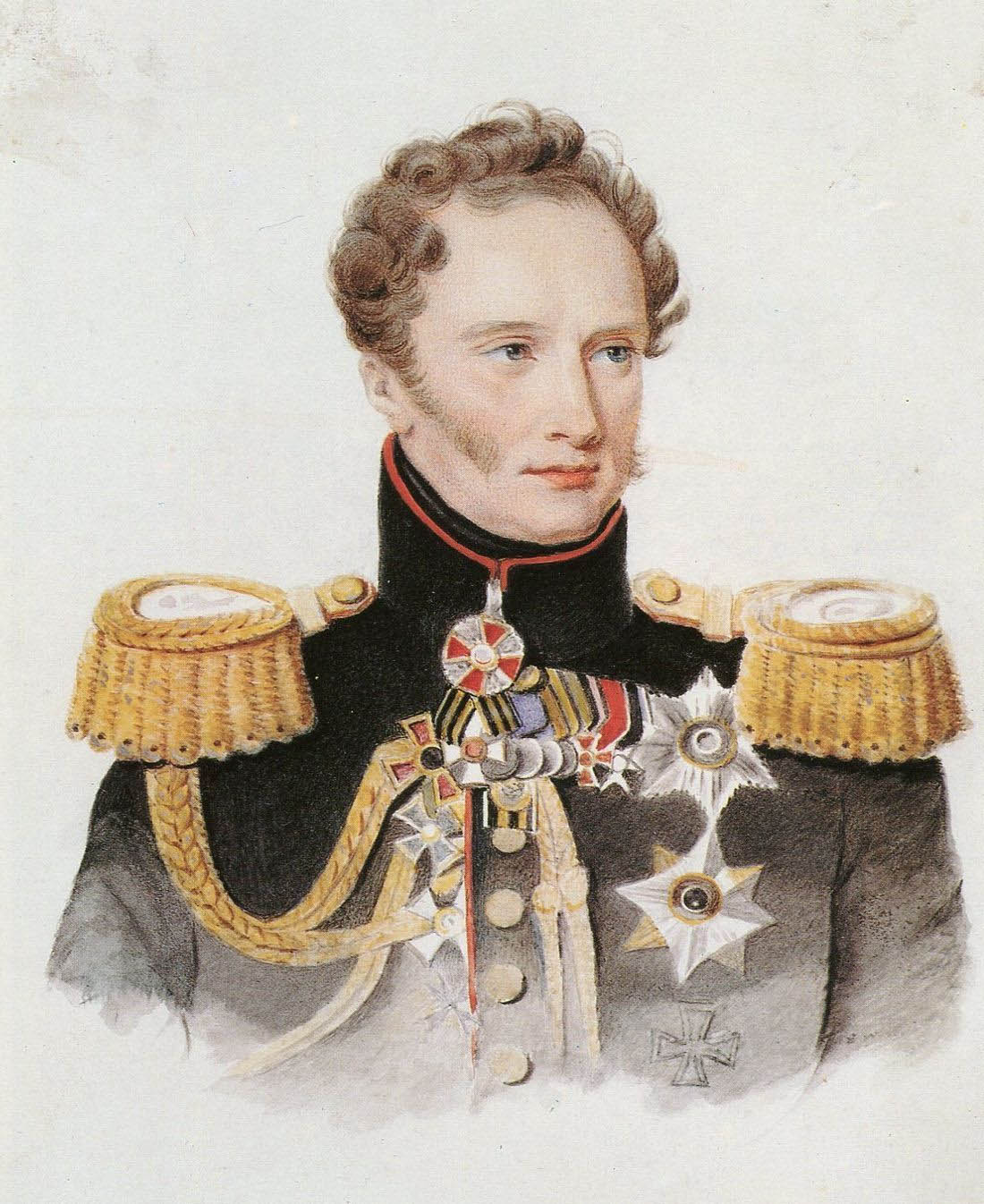 Орлов Алексей Федорович (1786-1861) - российский государственный деятель, граф, с 1856 г. князь, генерал-адъютант. Внебрачный сын графа Ф. Г. Орлова.